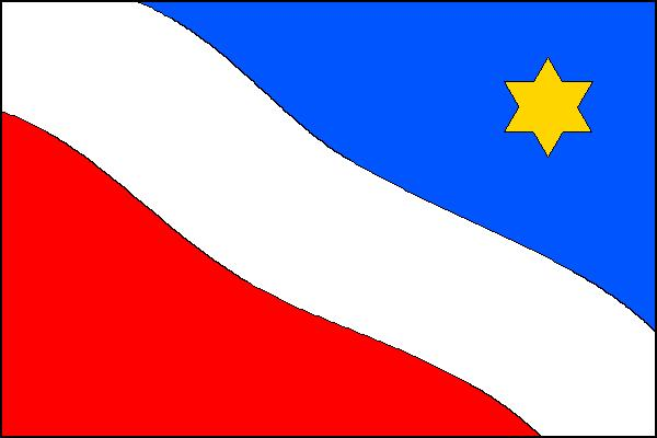 Vlajka obce Labská Stráň